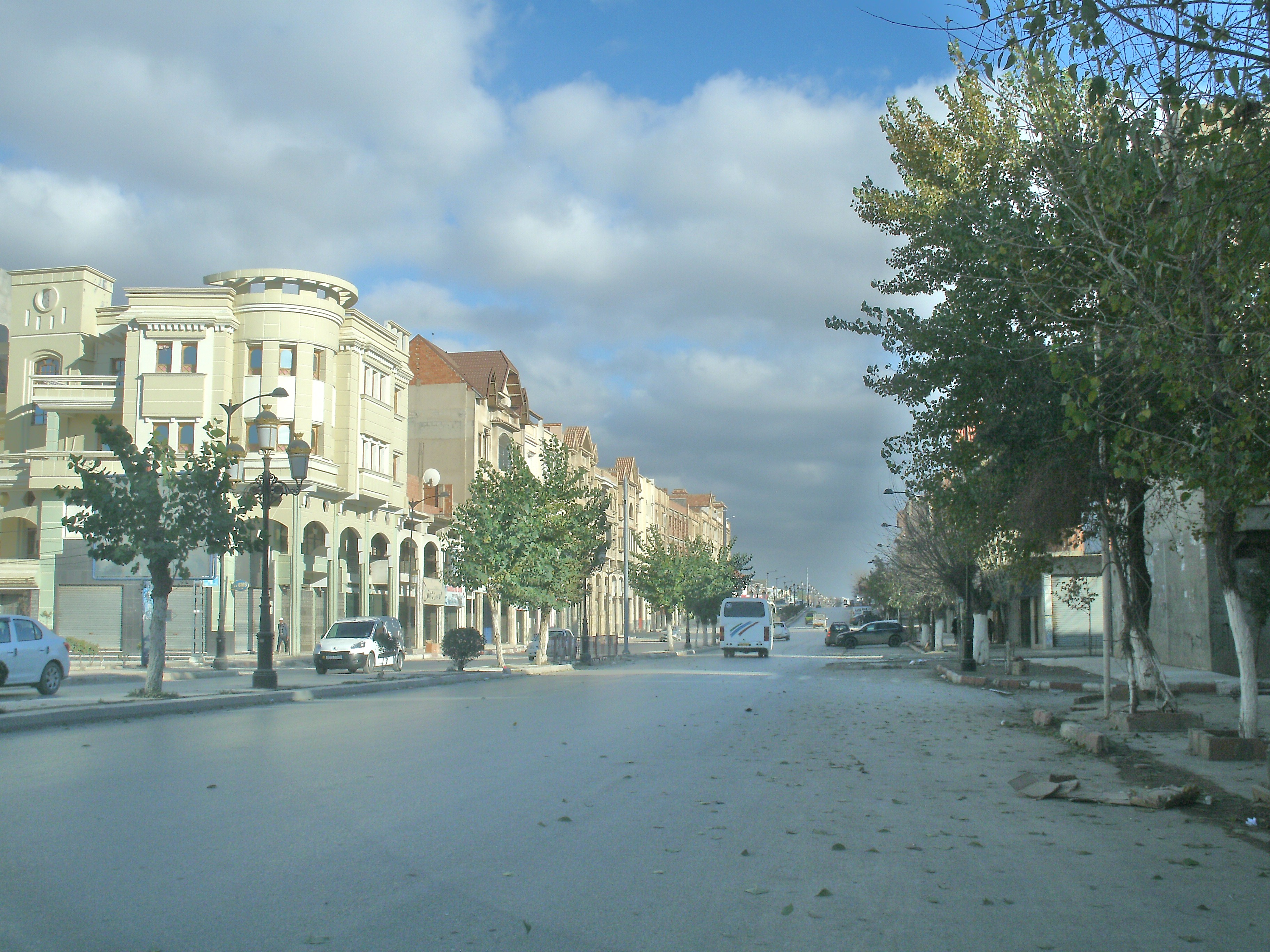 Rue centrale à El Eulma